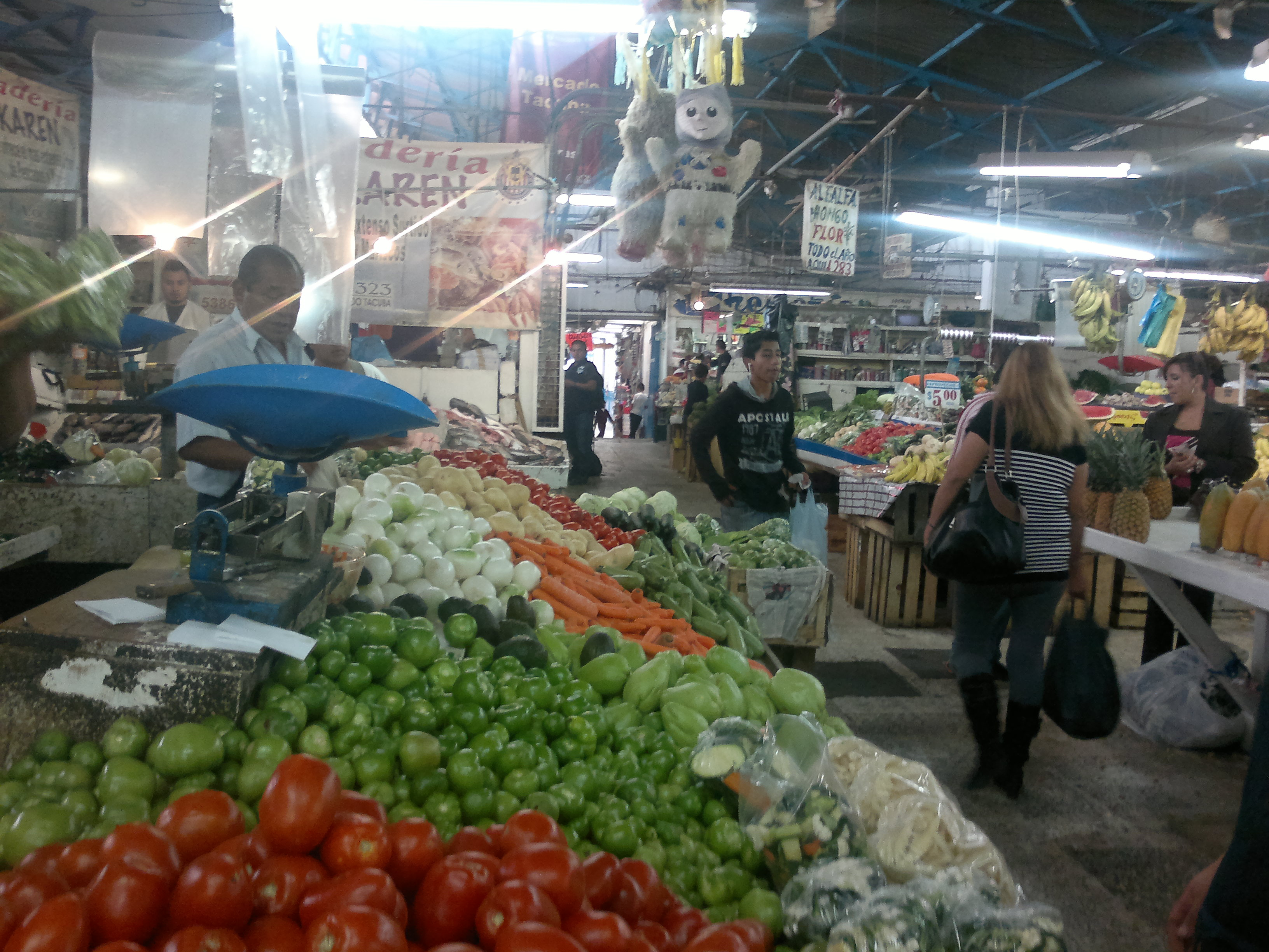 Dentro de los mercados públicos se da la principal movilización de la economía familiar.